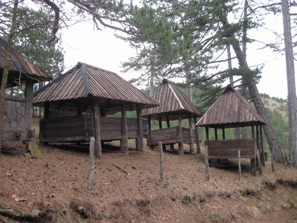 Sobrasice kraj crkve brvnare